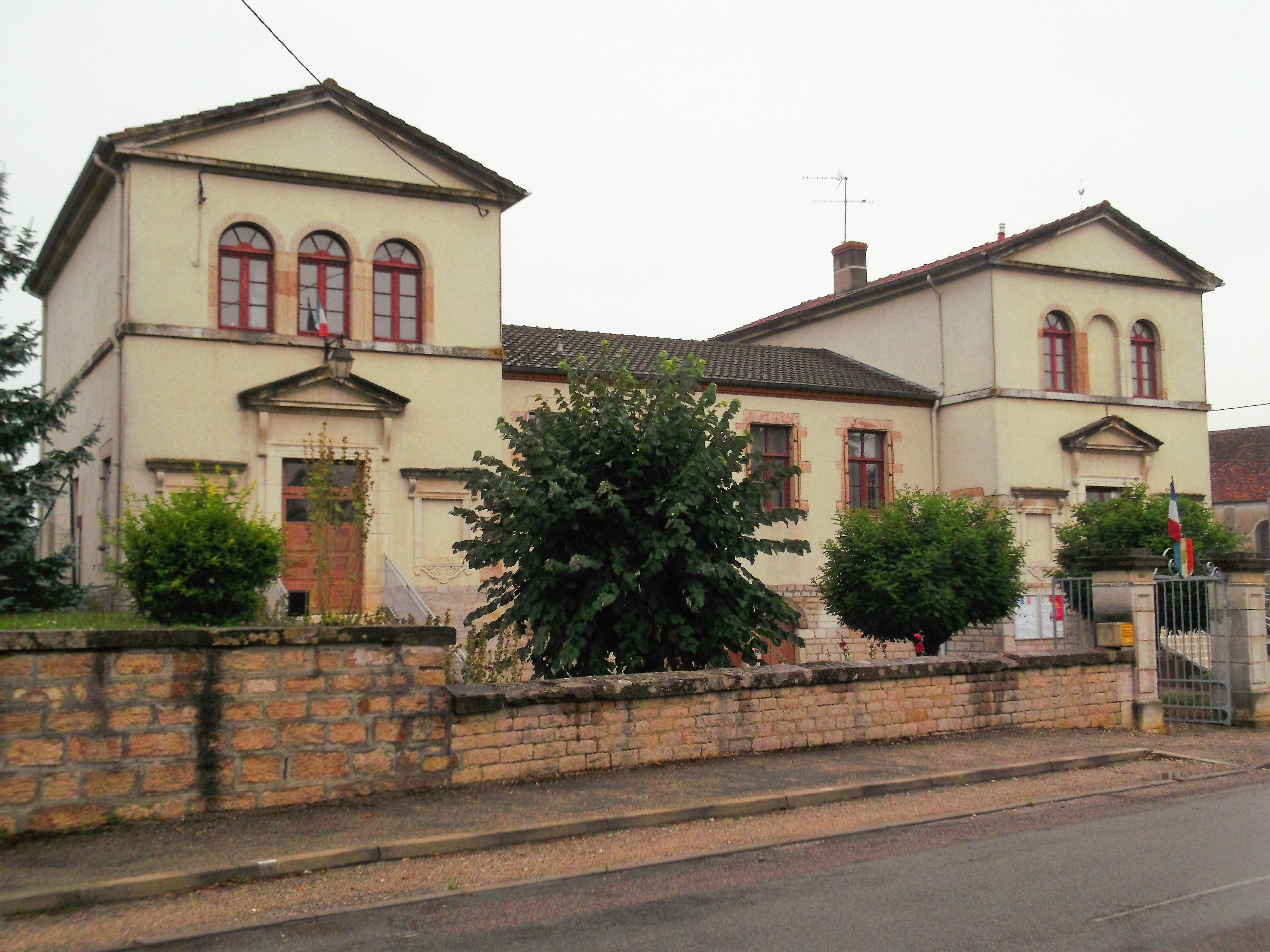 Urbodomo de Flammerans